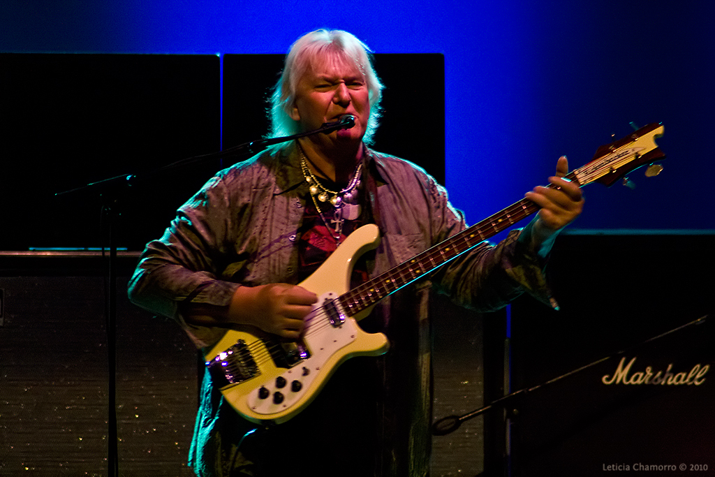 Yes concert at Gran Teatro del Banco Central del Paraguay, Asunción, Paraguay